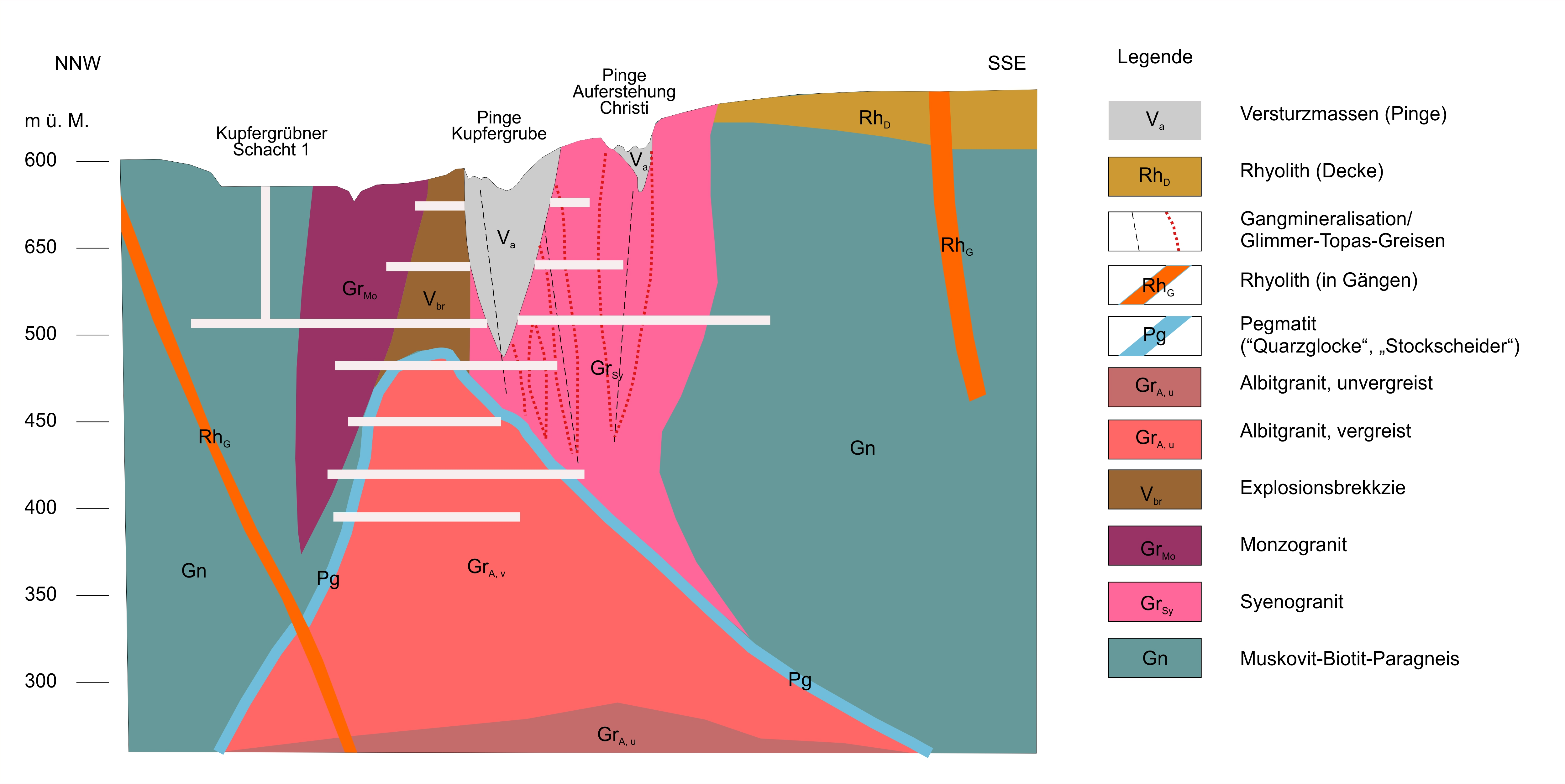 Geologischer Schnitt durch die Lagerstätte im Bereich der Kupfergrube Sadisdorf. Modifiziert nach: Ehser, A., Gruber, A.: Von der "Kupfergrube" zum Lithium-Zinn-Vorkommen, in: EDGG Exkursionsführer und Veröffentlichungen der Deutschen Gesellschaft für Geowissenschaften, S. 87 - 91, DGGV Heft 260, Berlin 2018 und Neubewertung von Spat-und Erzvorkommen im Freistaat Sachsen - Steckbriefkatalog, Sächsisches Staatsministerium für Wirtschaft und Arbeit, Dresden, Freiberg 2008